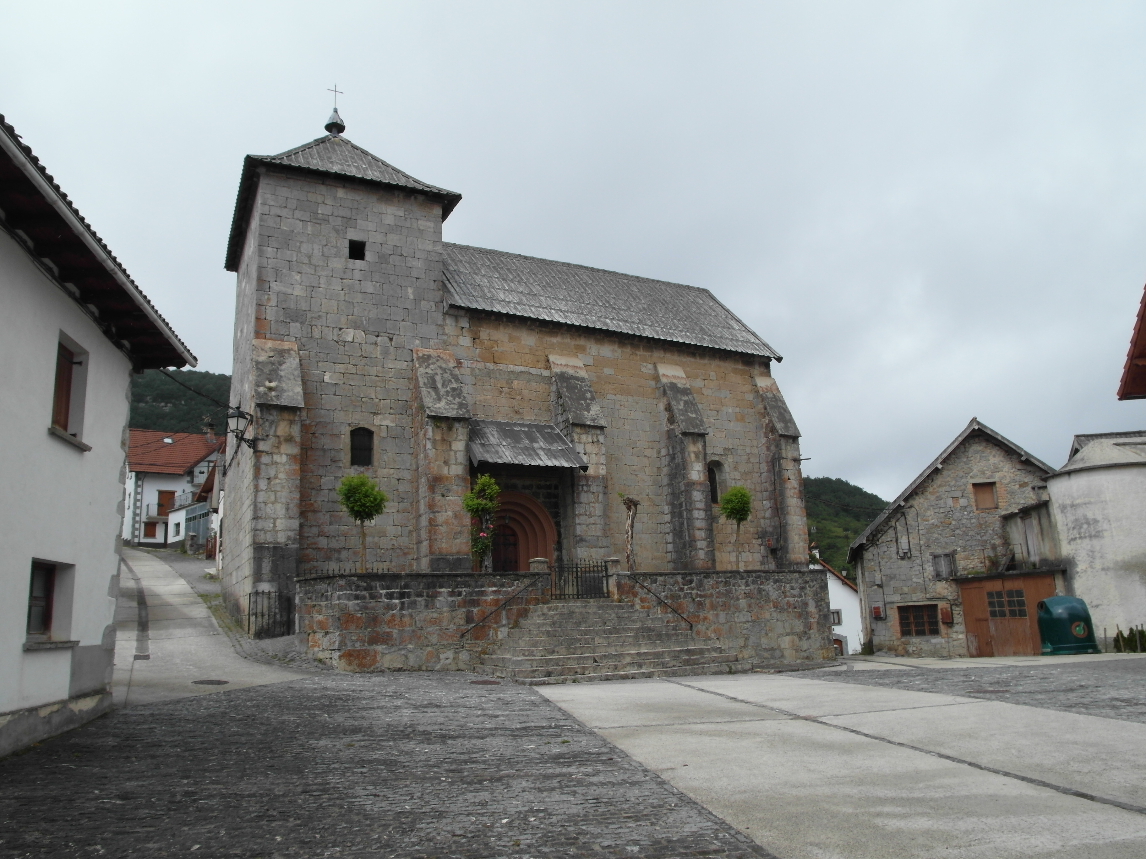 Iglesia de Orbara